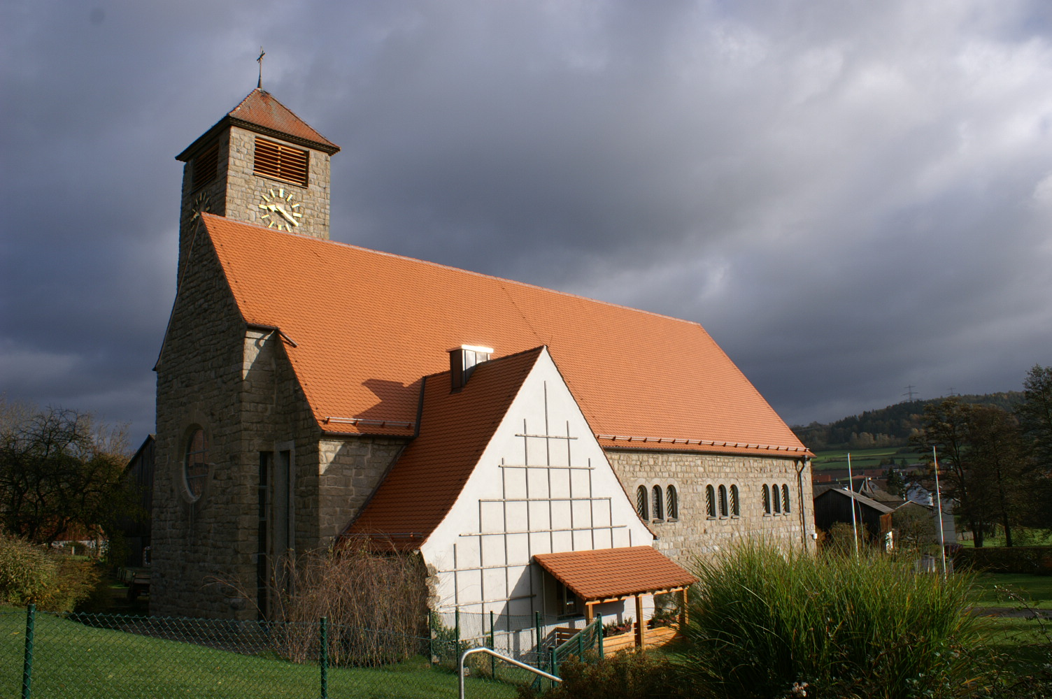 Die Kirche St. Josef in Bechtsrieth, fotografiert von Südwesten